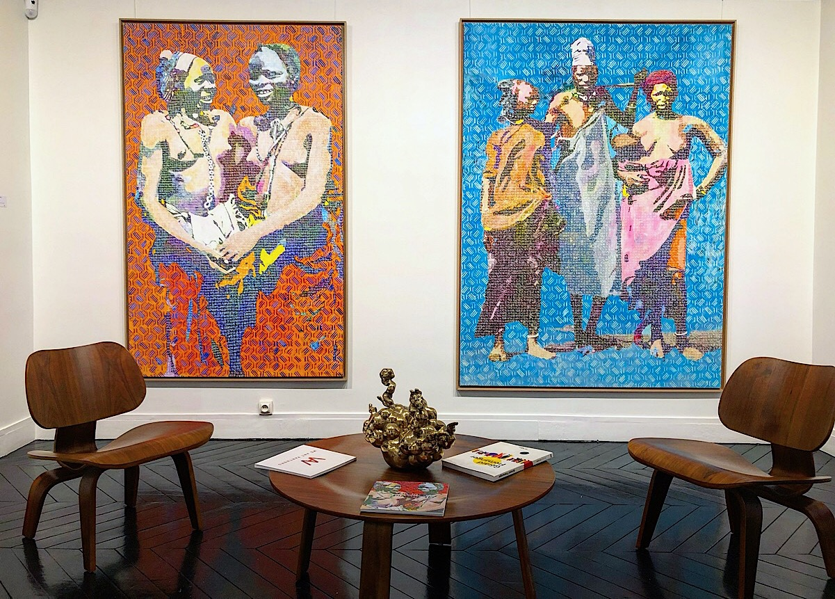 Deux peintures réalisées par Alioune Diagne côte-à-côte lors d'une exposition présentant le mouvement artistique du figuro-abstro.